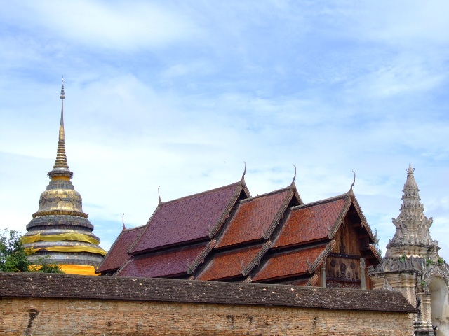 The present photo is taken or owned by Thanyakij. The camera used was: Fujifilm Finepix S9500.